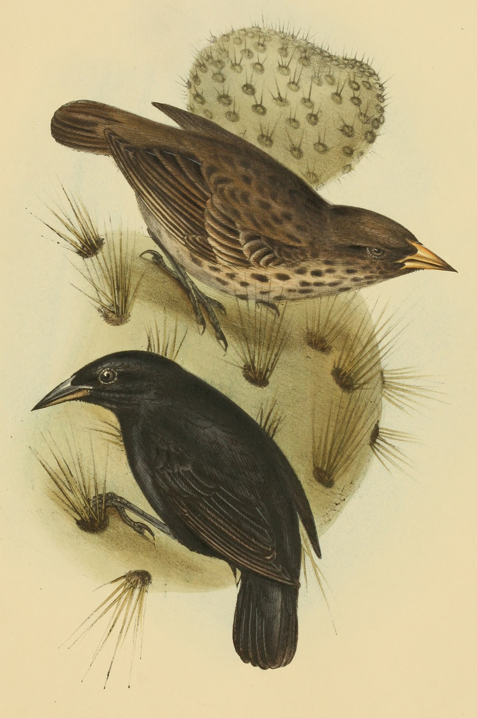 Kaktusfink (Cactospiza scandens oder Geospiza scandens) (laut Bild: Cactornis scandens - Laut diesem Text ist es ein Darwinfink, deshalb kommt nur der Kaktusfink infrage)